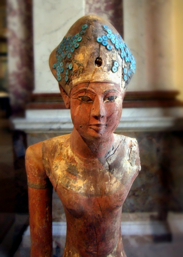 Statuette en bois polychrome représentant le pharaon Amenhotep Ier divinisé - XVIIIe dynastie égyptienne